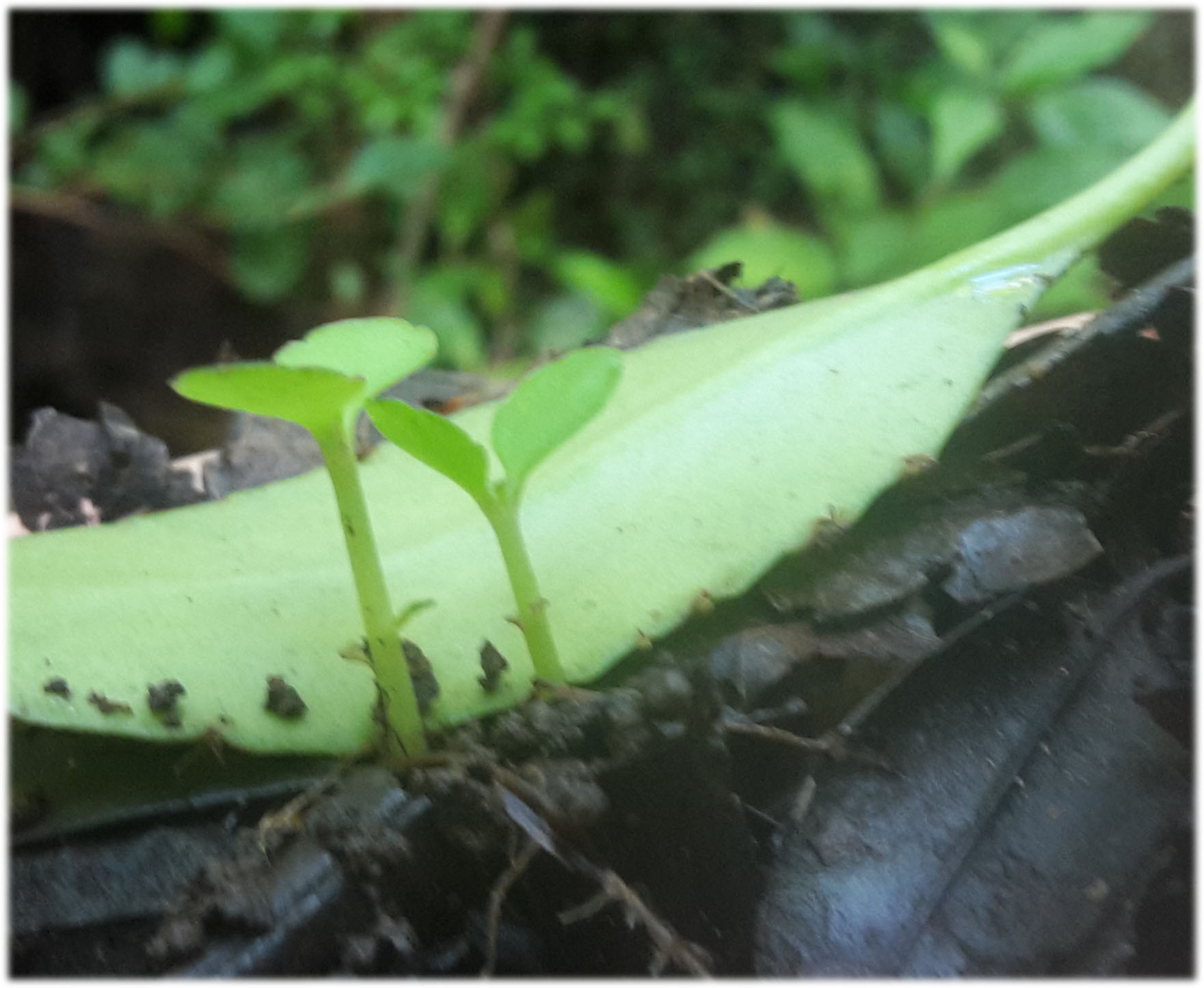 Jeunes pousses de Kalanchoe pinnata se développant naturellement à partir d'une feuille